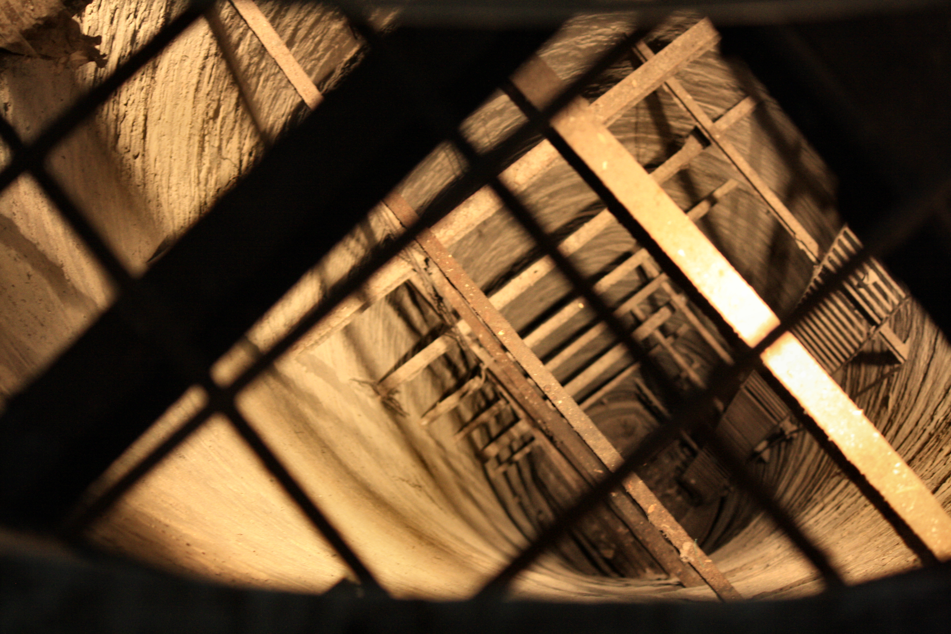 רחוב רוטשילד 19, ראשון לציון. מבט לתוך באר "מצאנו מים"', הבאר הראשונה שנחפרה בראשון ובה נמצאו מים שאפשרו את קיום המושבה.